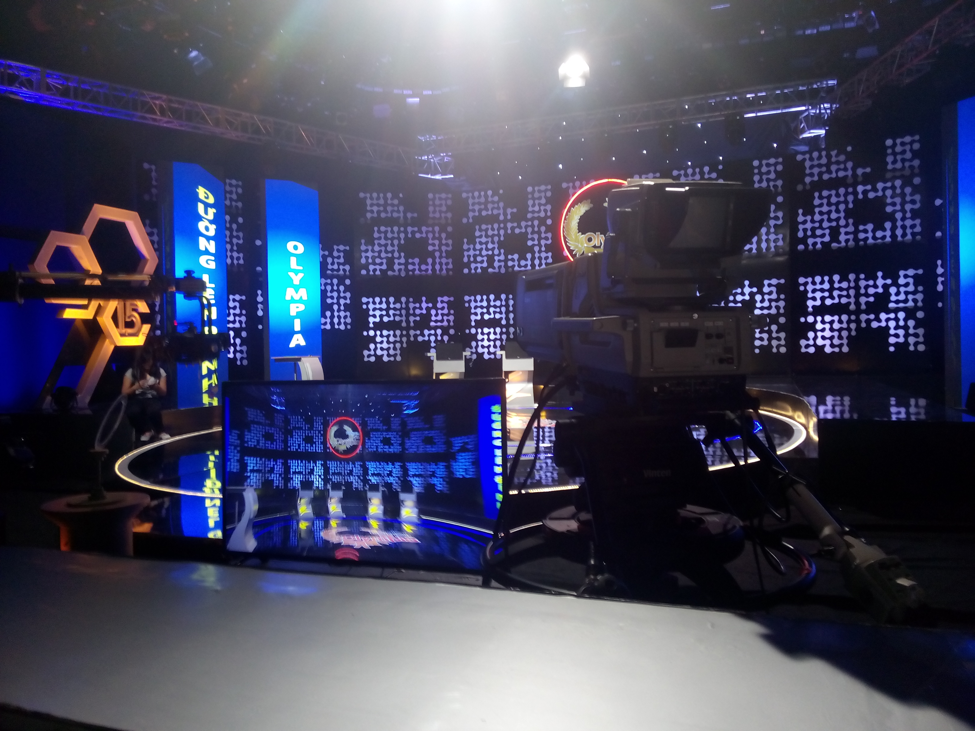 Một góc trường quay S14, Đài Truyền hình Việt Nam